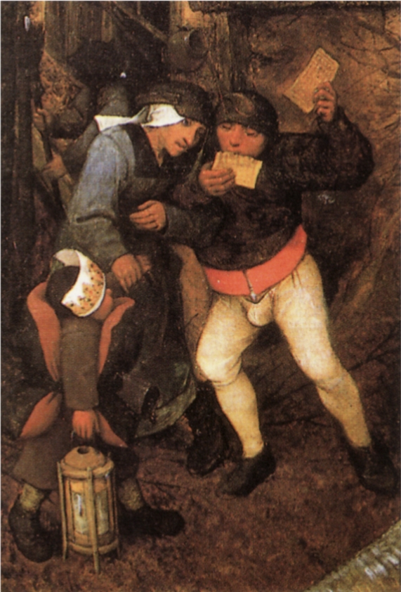 Eines der Kinder trägt eine Papierkrone als Hinweis auf Dreikönig und das andere isst eine Waffel, ein Karnevalsgebäck. Ausschnitt aus Bruegels Jahreszeitenbild Der düstere Tag